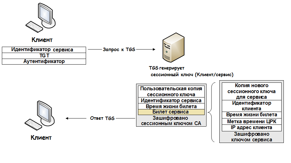 Авторизация клиента на TGS